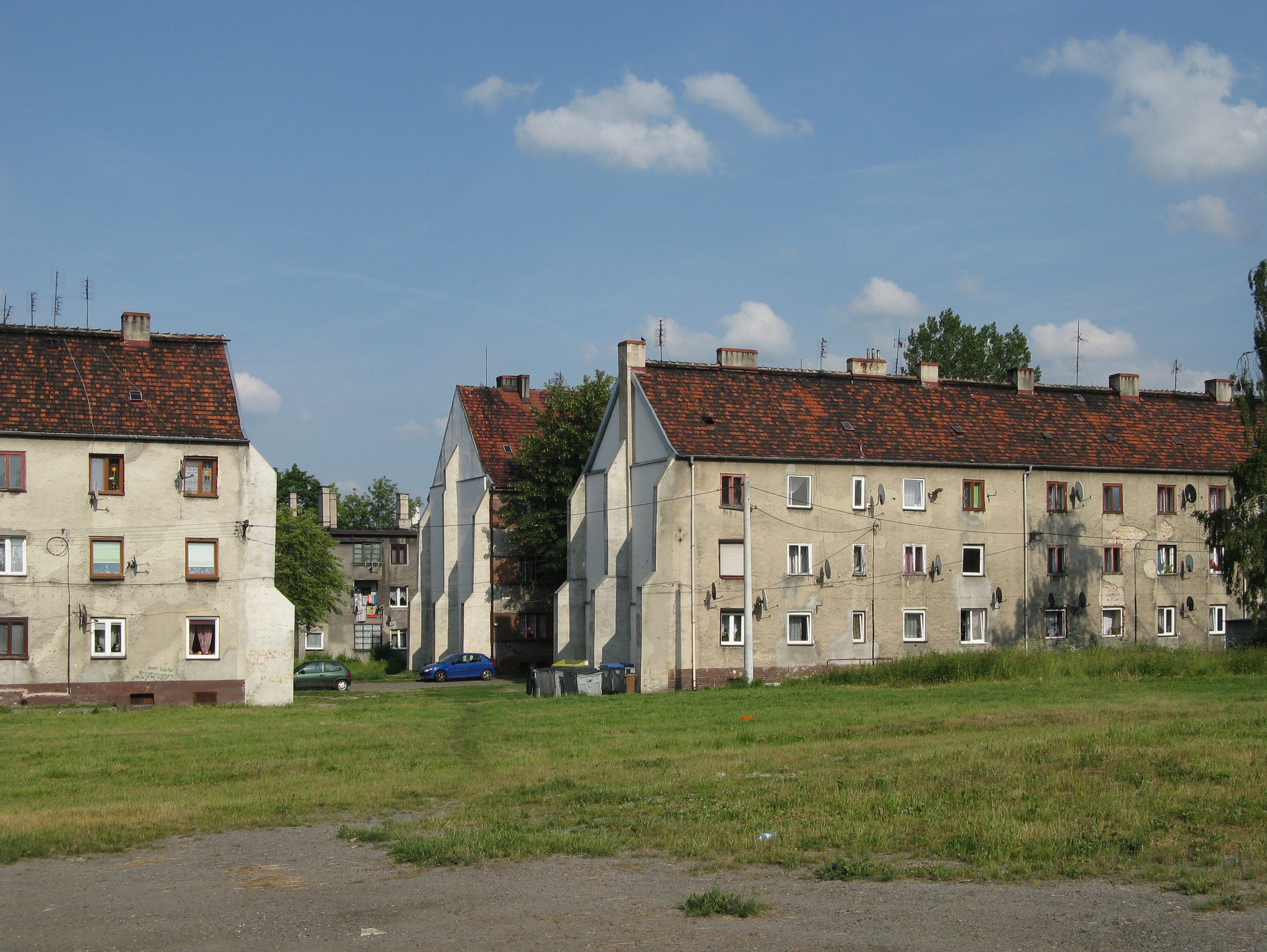 Zabudowa przy ul. Krańcowej w Bytomiu-Karbiu, widoczne przerwy w ciągu zabudowy po wyburzonych budynkach pod numerami 7 i 6 (w głębi).